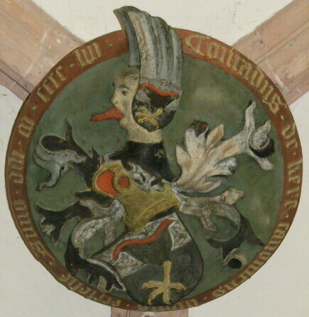 Wappen der Familie von der Kere, Gewölbe im Domkreuzgang des Würzburger Domes